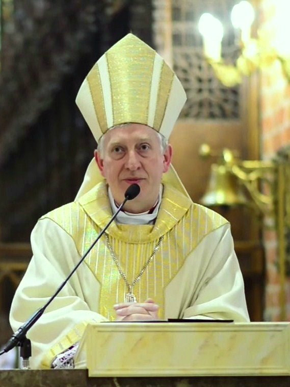 Dr Ryszard Kasyna, biskup pomocniczy gdański i biskup diecezjalny pelpliński.